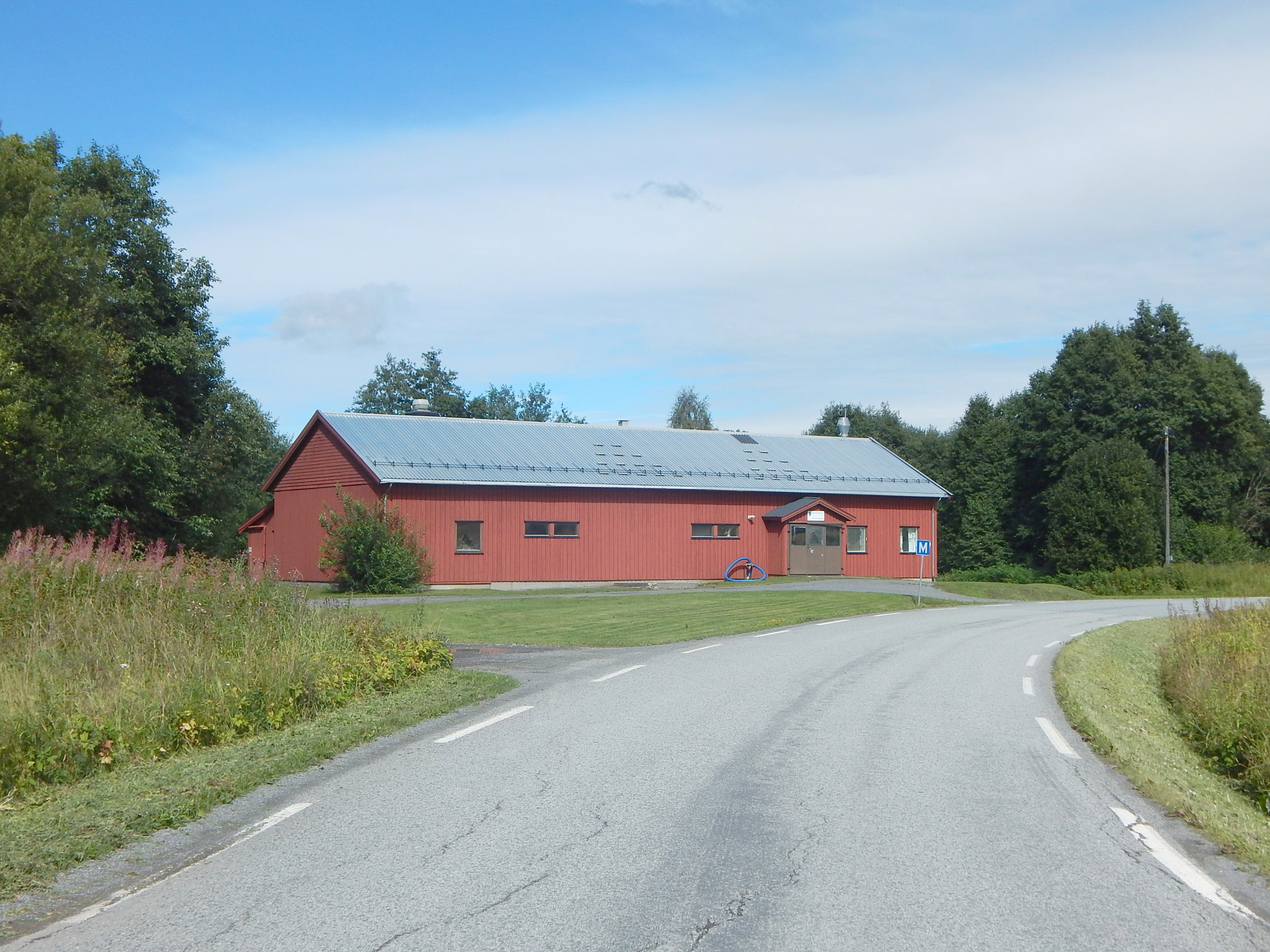 Vømmølsvika (fylkesvei 2342, tidl. 76)